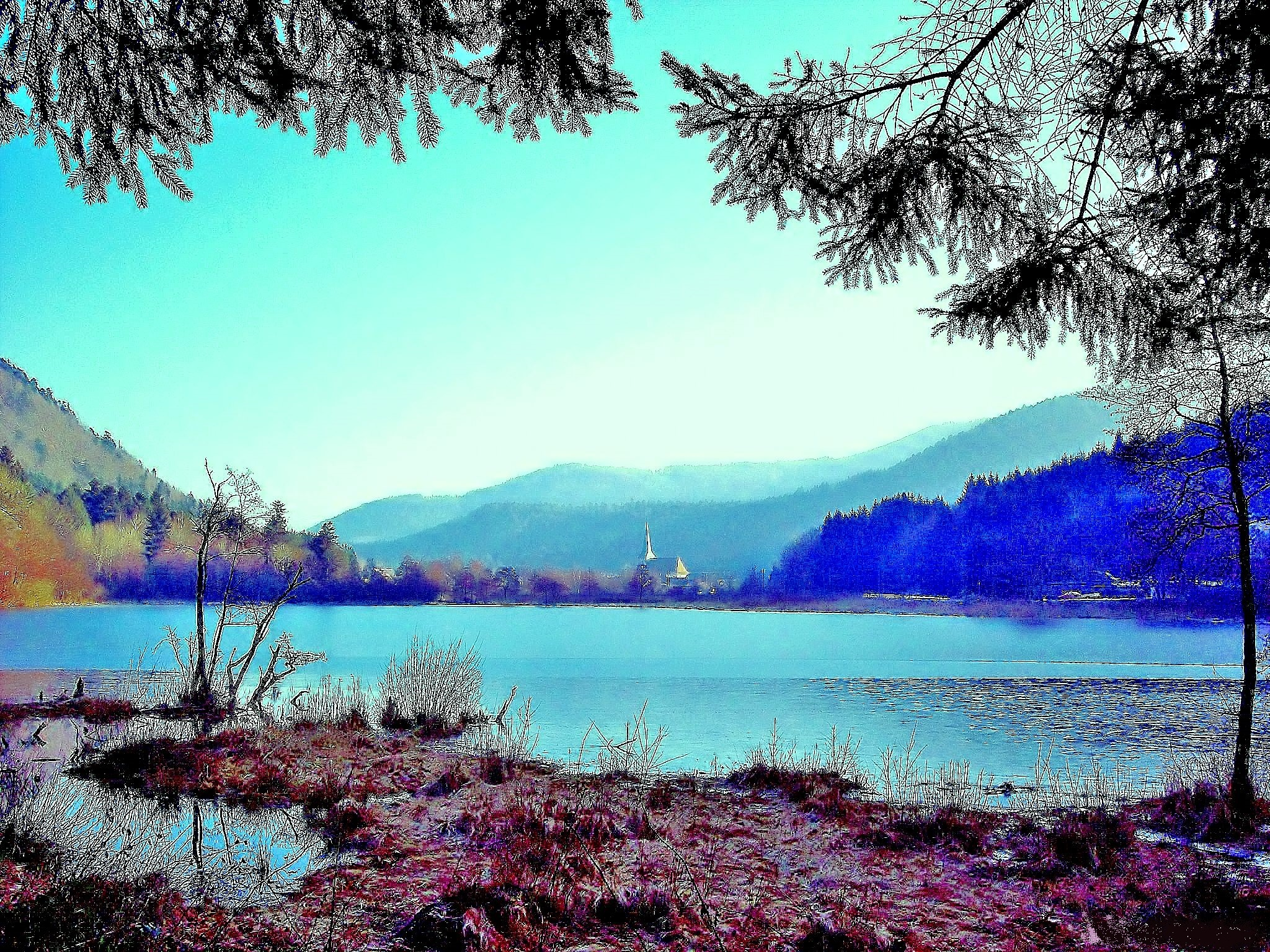 Village de Séwen vu de derrière le lac, l'hiver.